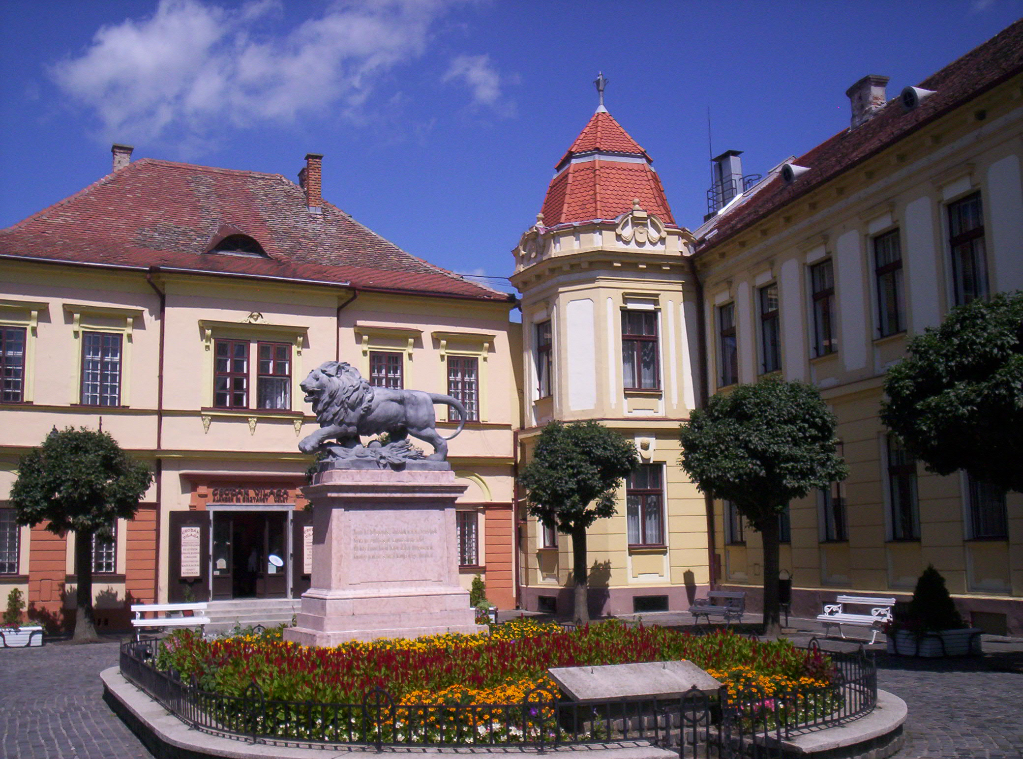 A szigetvári Oroszlános emlékmű. Zrínyi Miklós és a szigetvári hősök tiszteletére állították 1878-ban – photo taken by uploader User:Csanády in 2006.